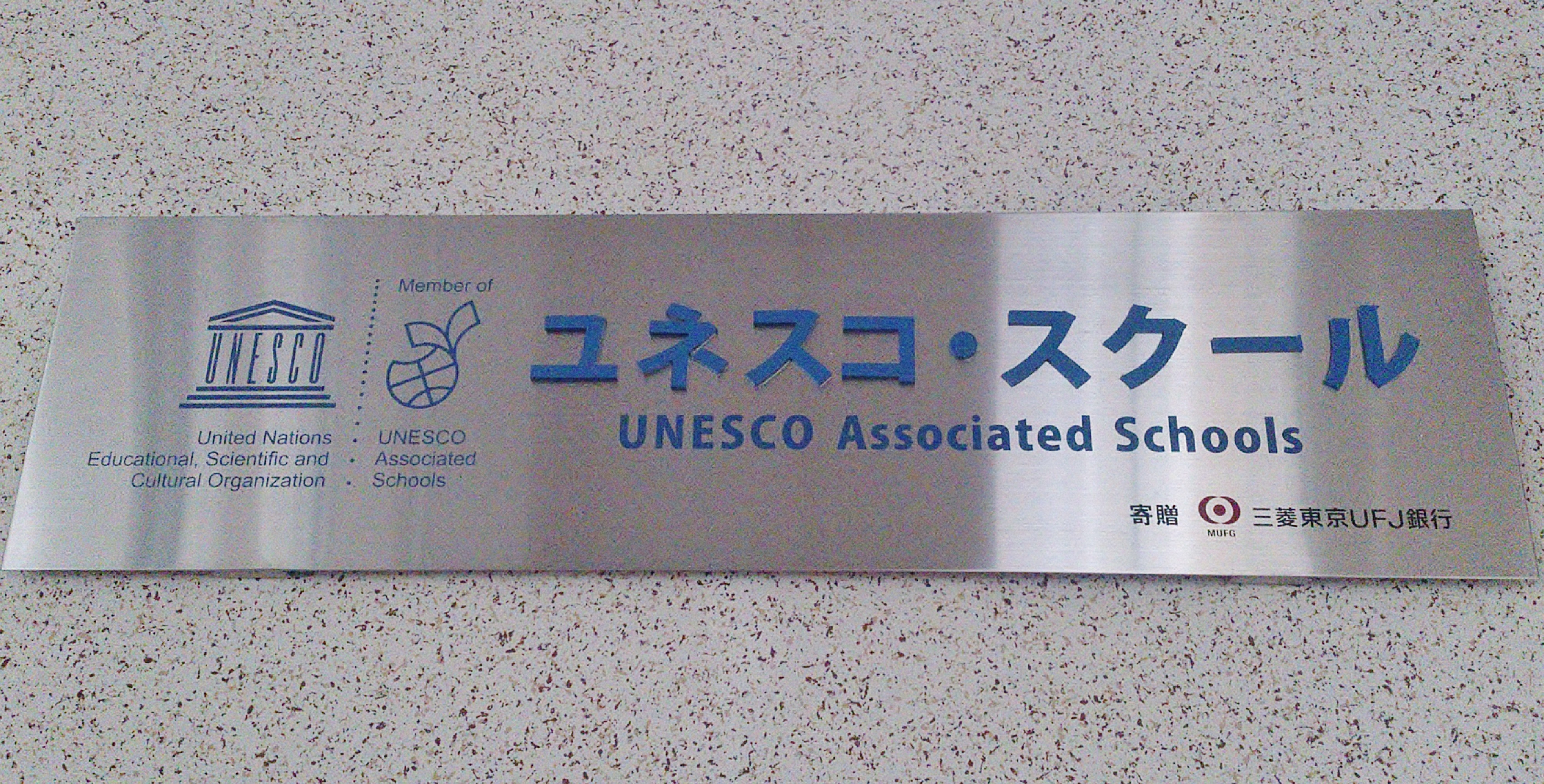 新潟県 長岡市 南町二丁目 長岡市立 南中学校 にて撮影